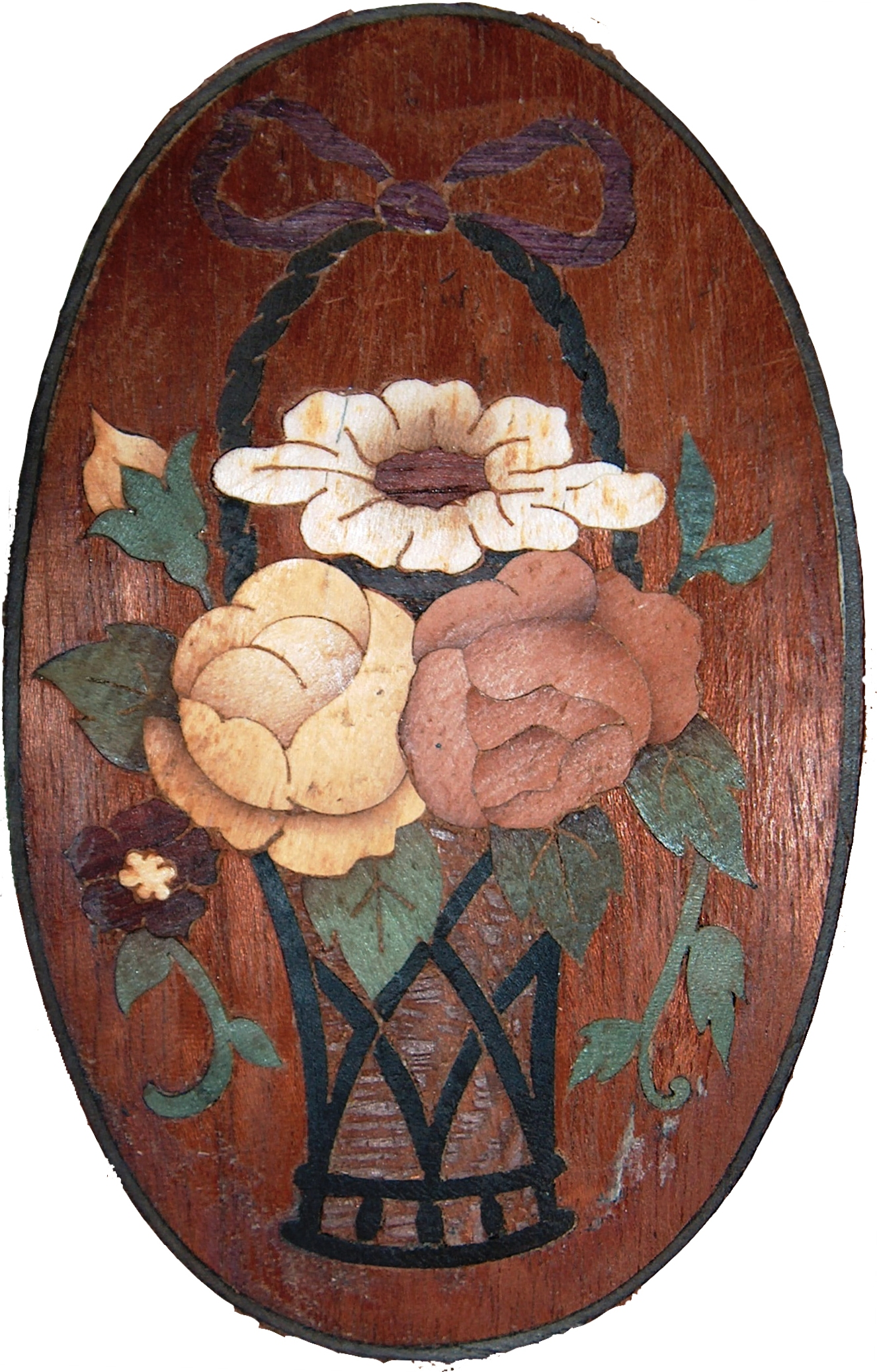 Intarsia